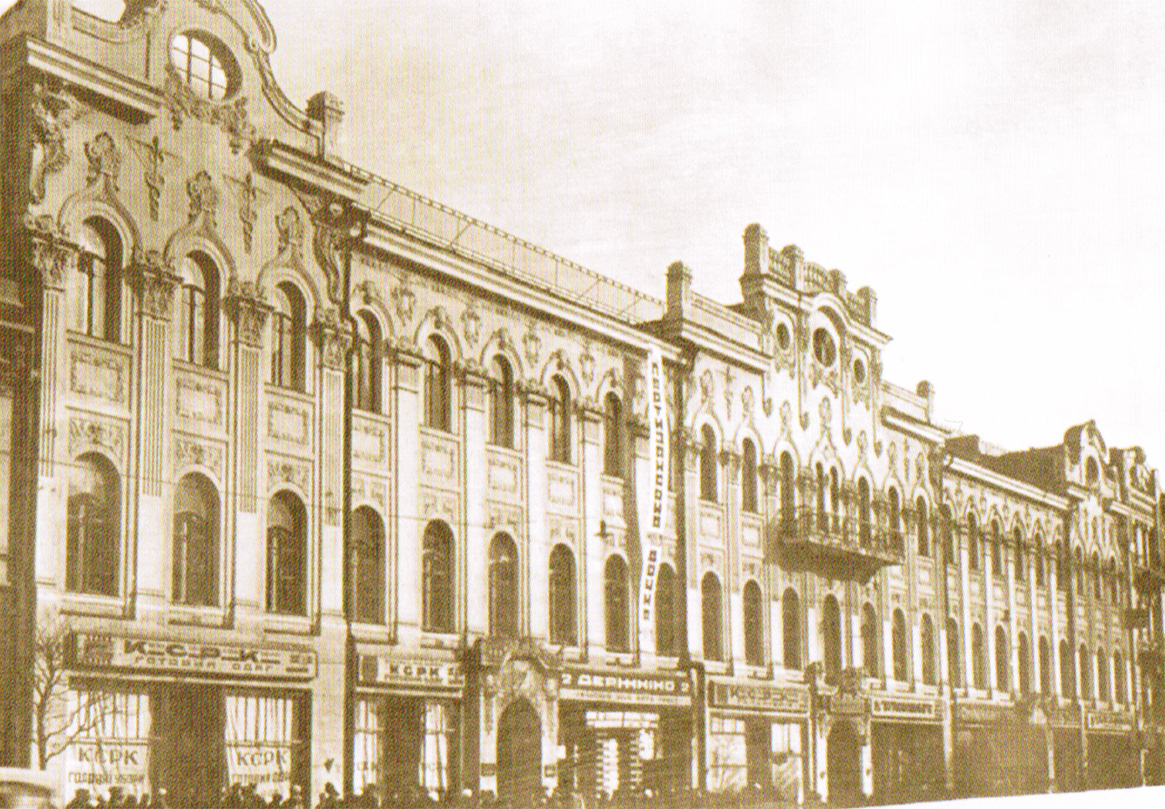 Генеральне секретарство земельних справ Української Народної Республіки, Київ. Будинок у стилі бароко. Знищено під час Другої світової війни.